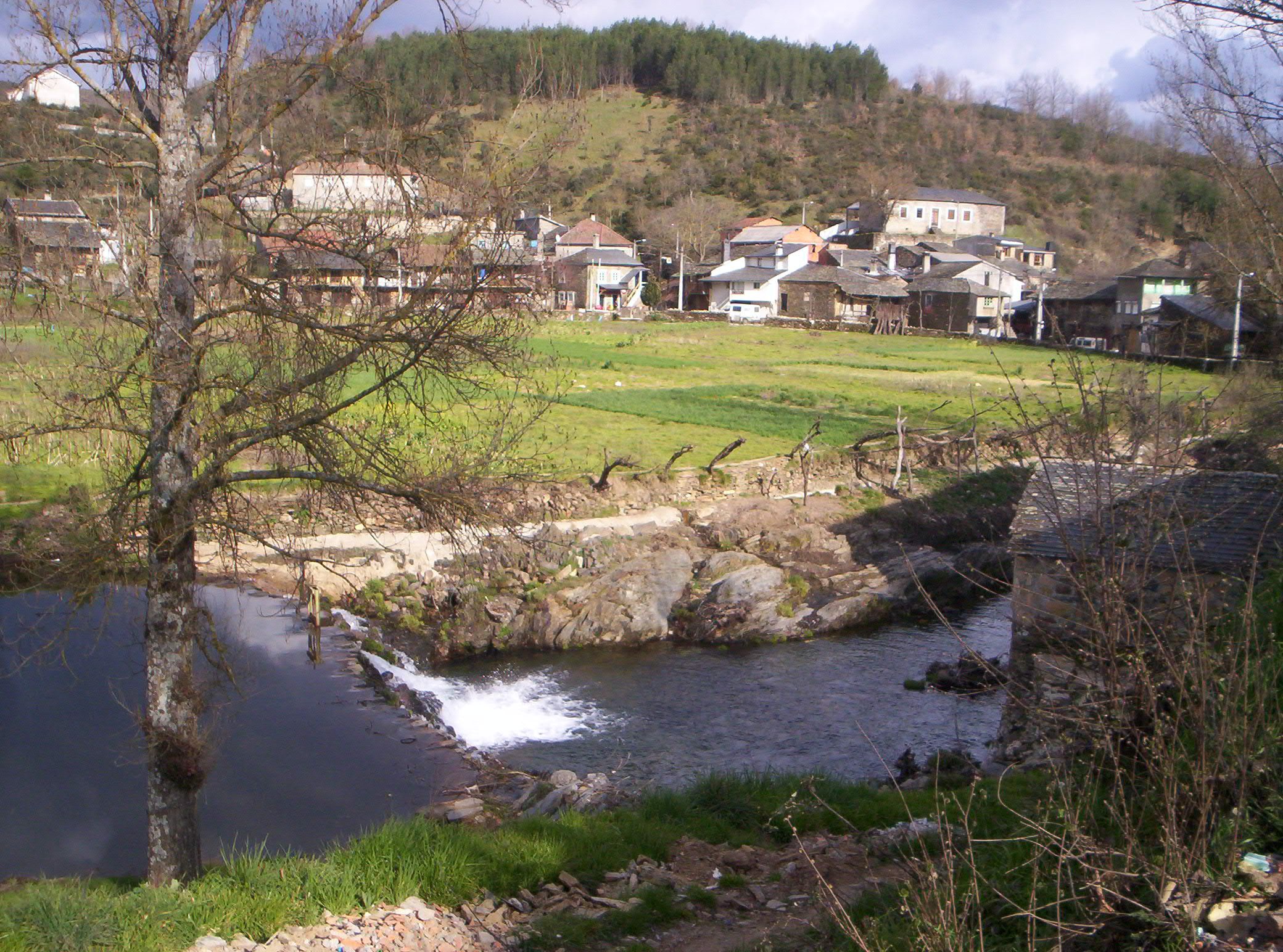 Rio de onor, em Bragança, em Portugal.